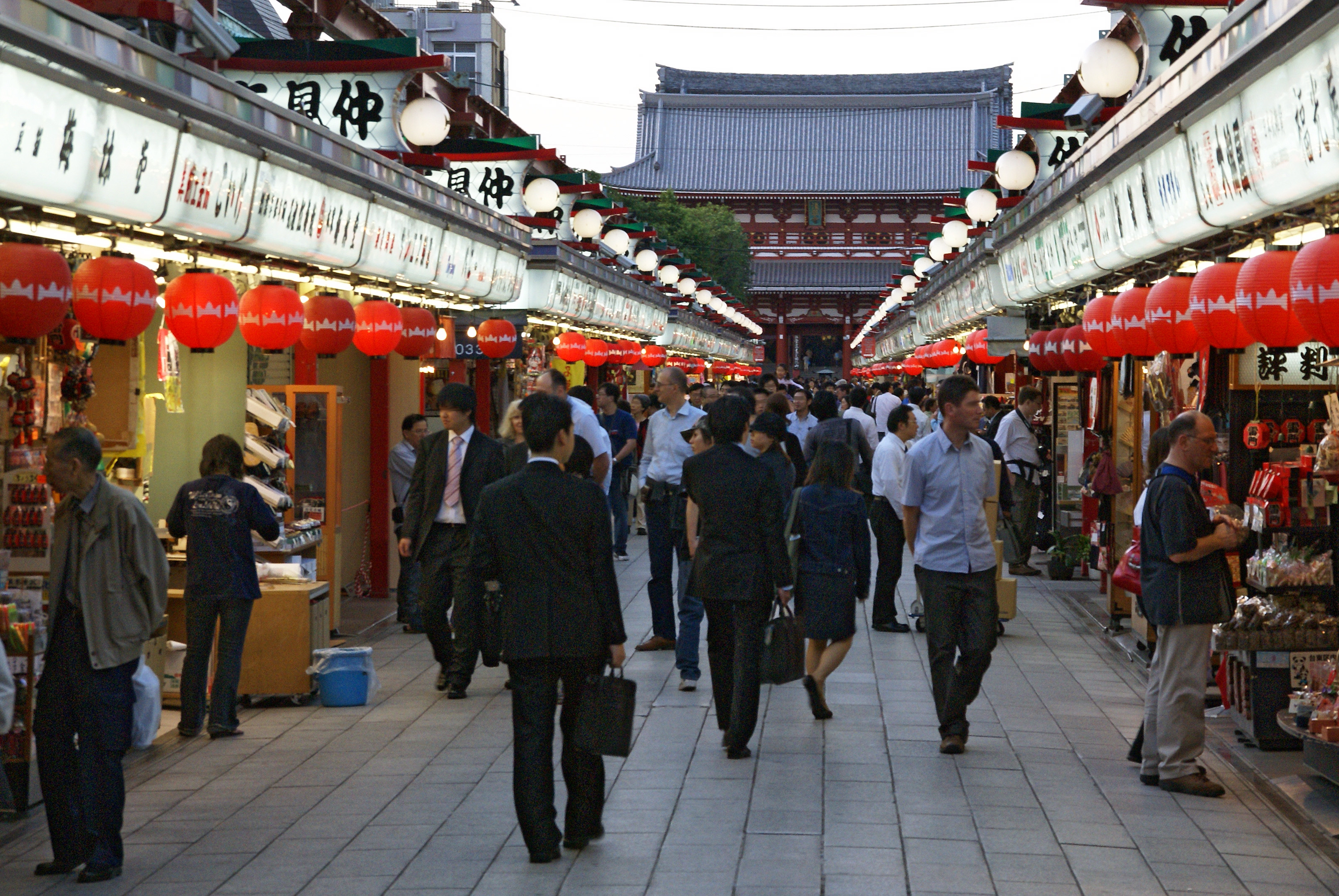 Sensoji in Taito-ku, Tokyo, Japan